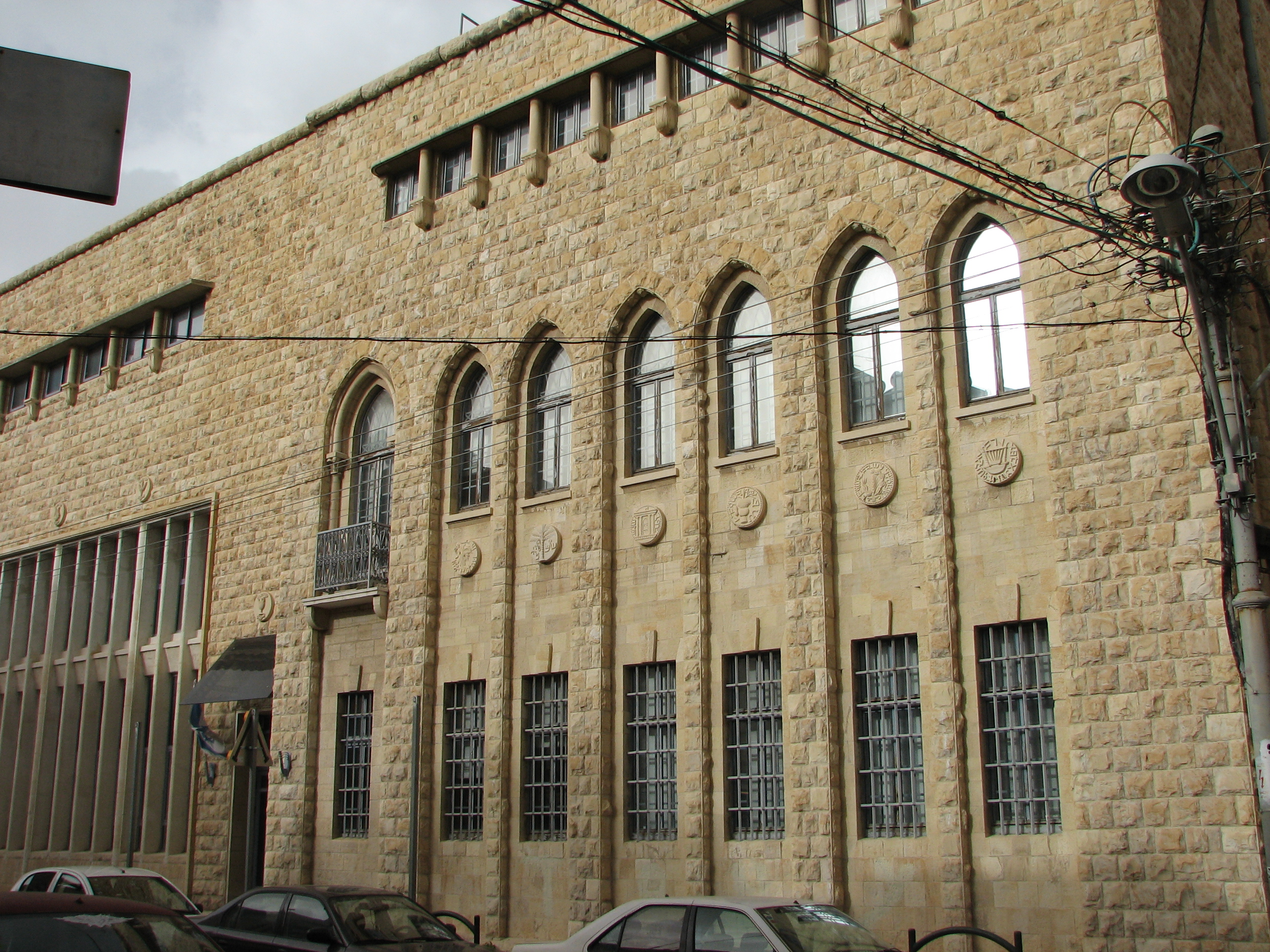 City Building, Haifa בני הסיטי בחיפה בעיר התחתית ברחוב נתנזון 1 לשעבר דרך יפו. נבנה ב-1925 כדי לשמש כסניף בחיפה של בנק אפ"ק. היום משמש כמבנה עסקים, שוכנת בו הקונסוליה של פורטוגל